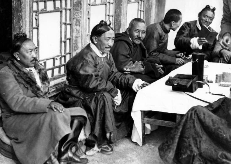 Lhasa, Gäste bei uns, von links nach rechts: Kijbu, Ringan, Möndo, Chang und Tsarong Dzasa